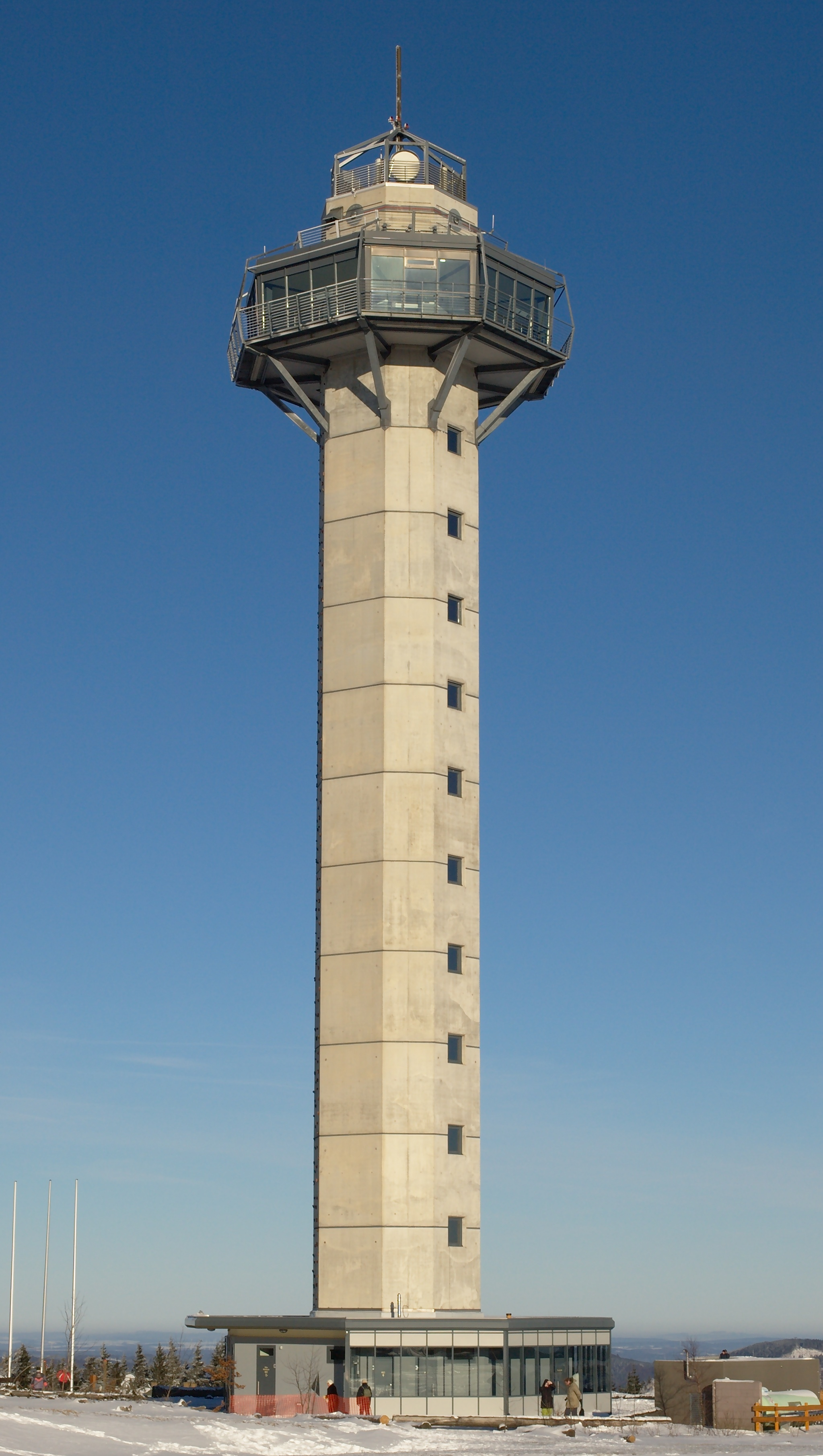 Hochheideturm Ettelsberg (Willingen)